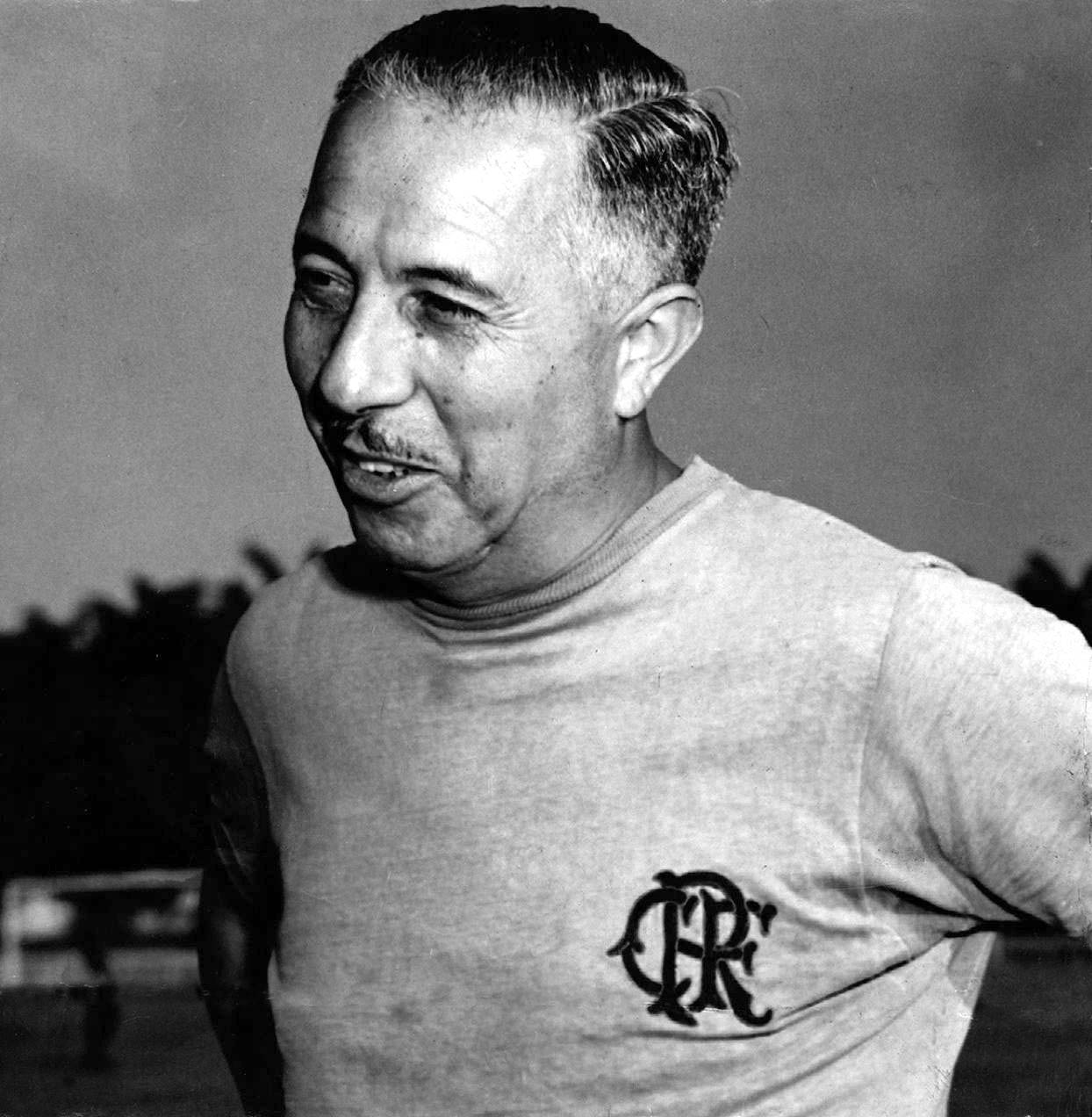 Imagem do Fundo Correio da Manhã.